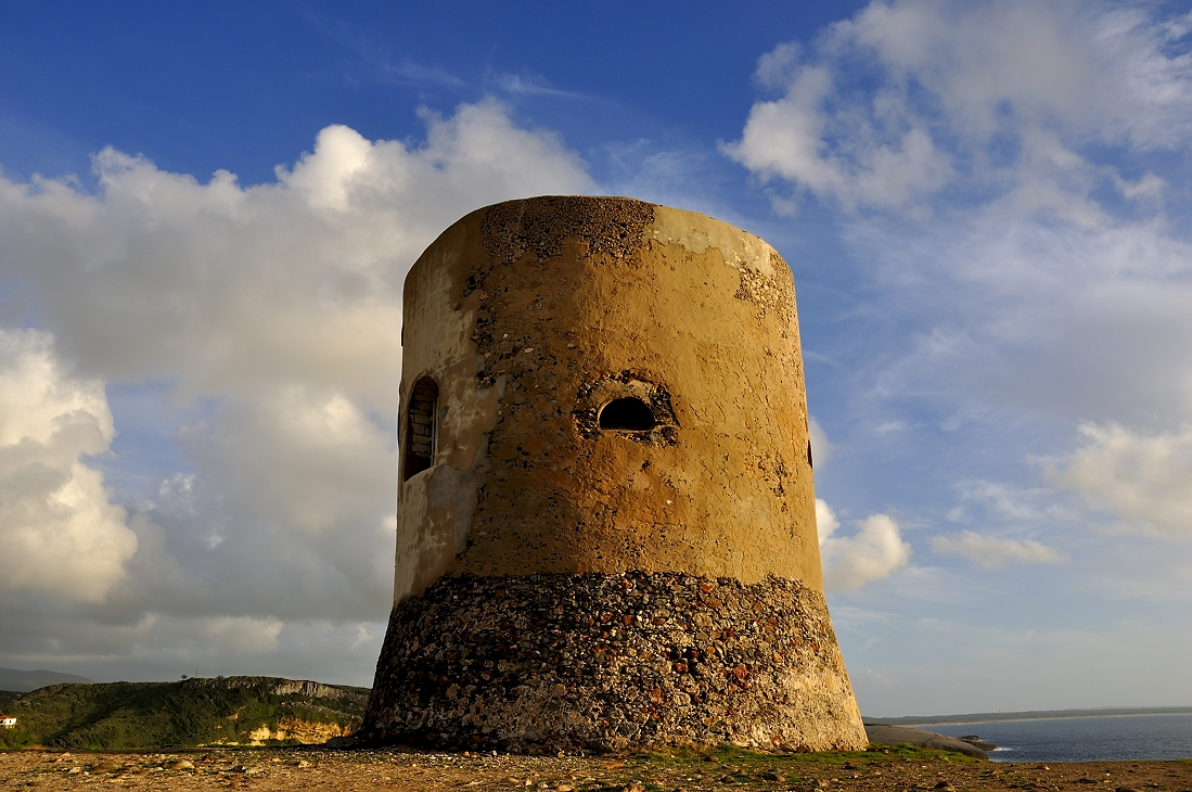 Torre costiera